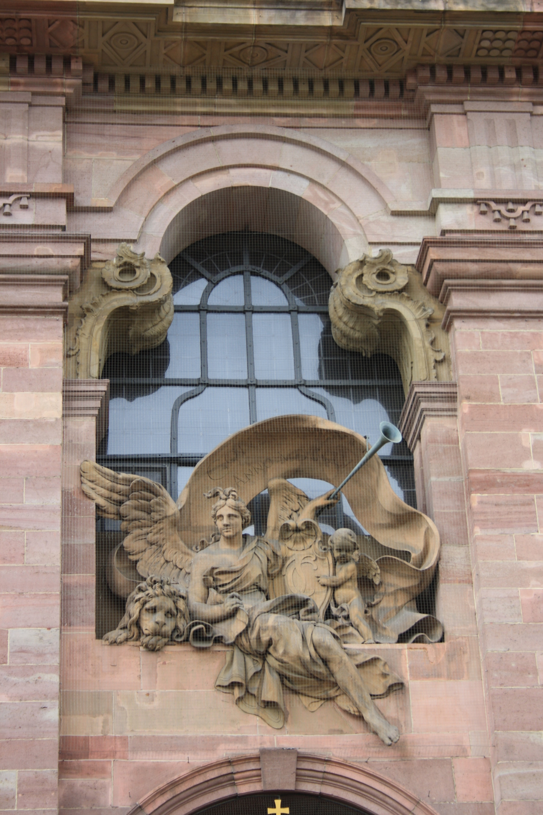 Skulpturen Front